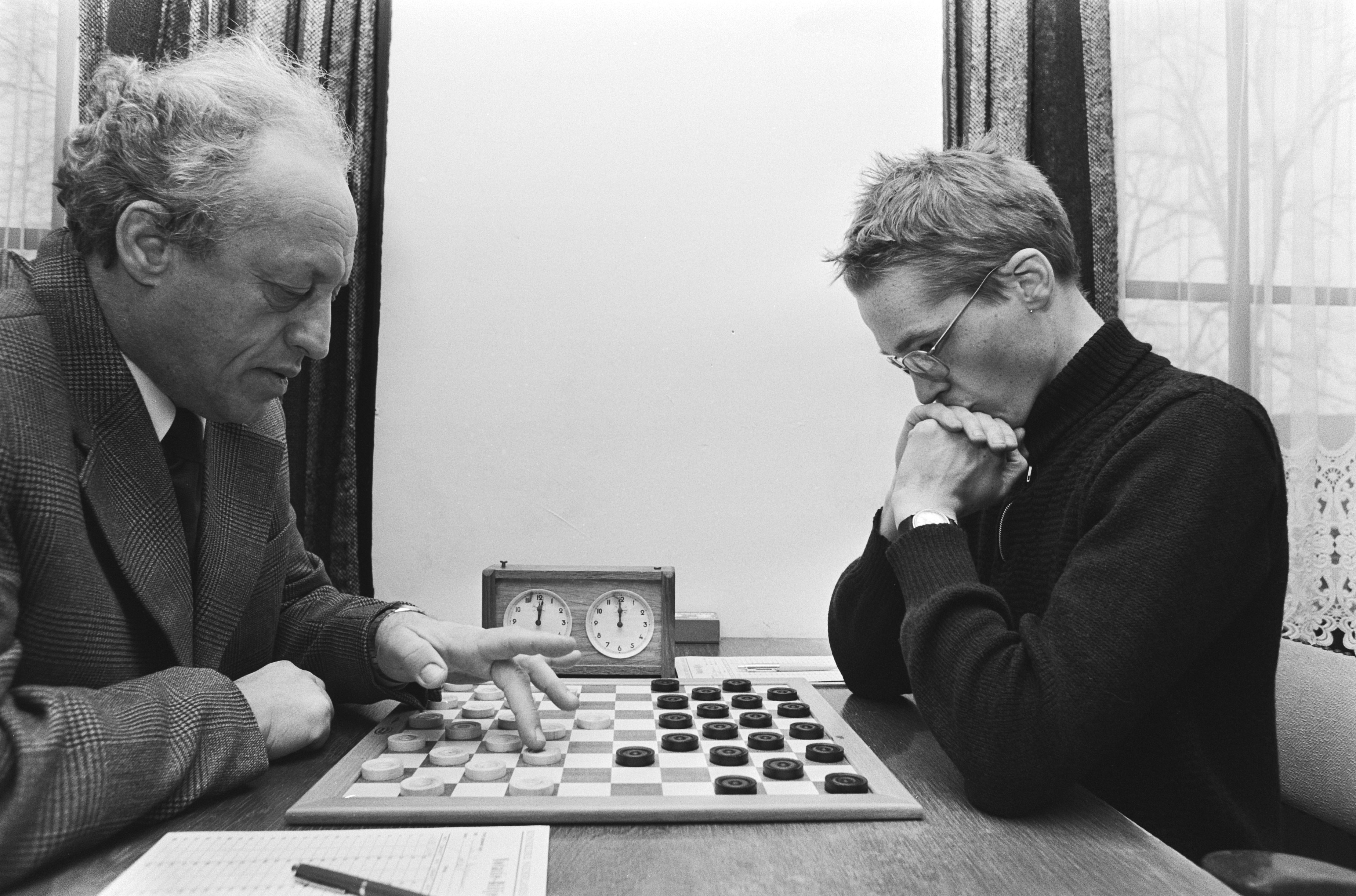 Collectie / Archief : Fotocollectie Anefo Reportage / Serie : Damtweekamp Koeperman tegen v.d. Wal in Abcoude Beschrijving : Iser Koeperman (links) en Jannes van der Wal Datum : 2 maart 1979 Locatie : Abcoude, Utrecht Trefwoorden : damsport, tweekampen Persoonsnaam : Koeperman, Iser, Wal, Jannes van der Fotograaf : Croes, Rob C. / Anefo Auteursrechthebbende : Nationaal Archief Materiaalsoort : Negatief (zwart/wit) Nummer archiefinventaris : bekijk toegang 2.24.01.05 Bestanddeelnummer : 930-1469